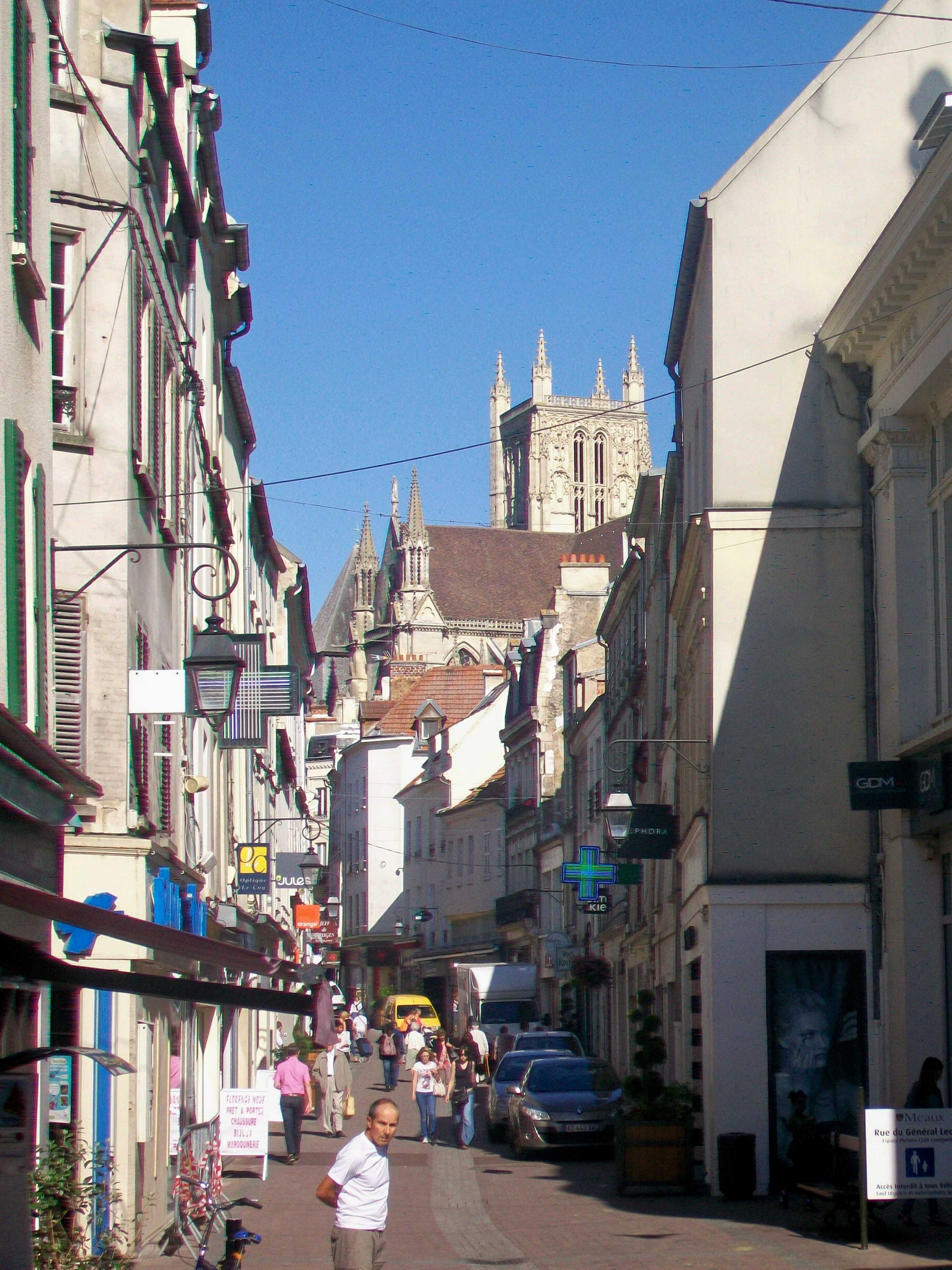 La rue du général Leclerc, vue en direction de la cathédrale.